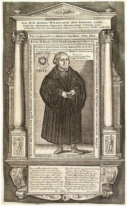 das Epitaph für Luther in Jena in der Darstellung aus der Weimarer Kurfürstenbibel